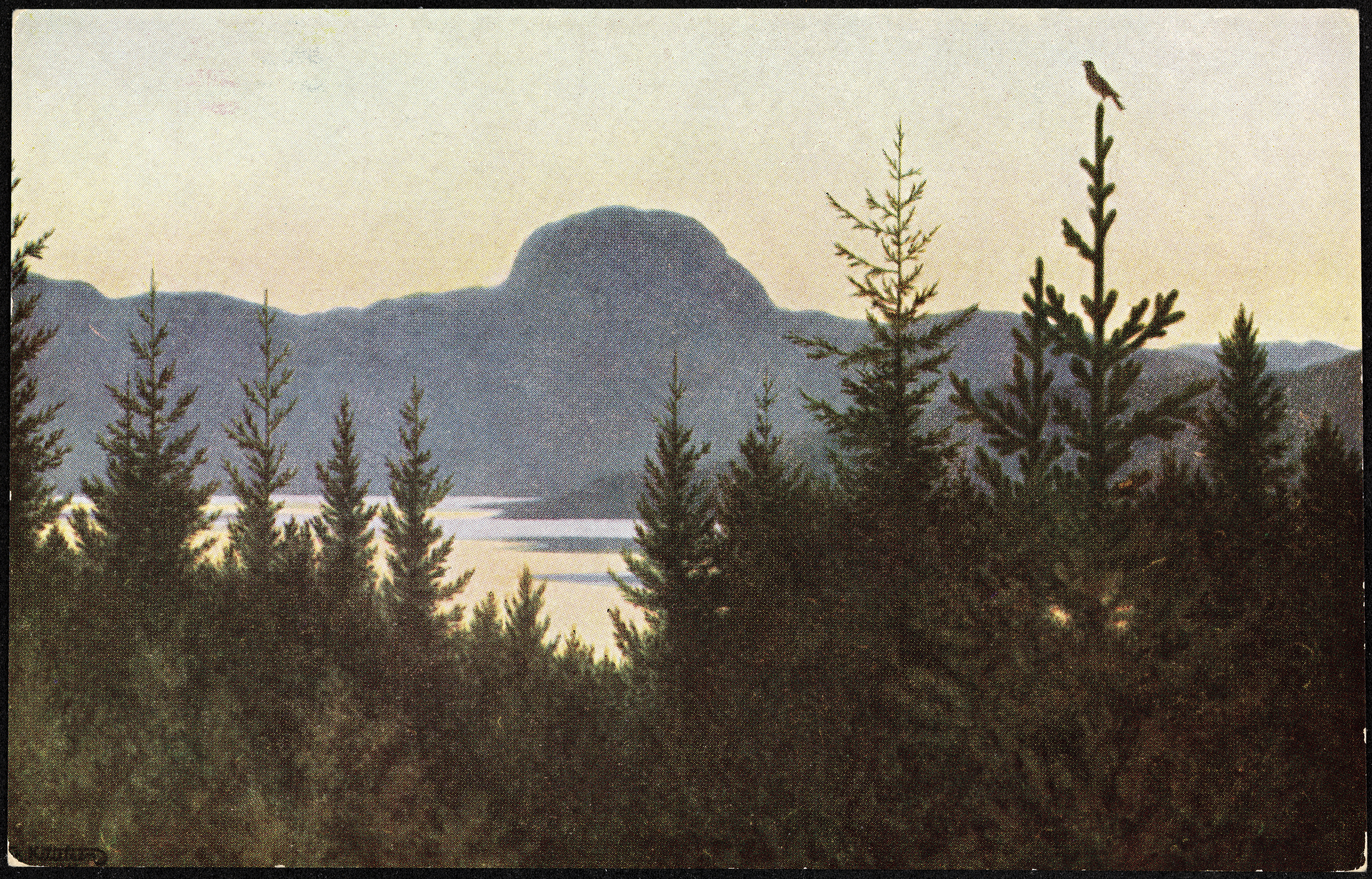 Beskrivelse / Description: Andersnatten (733 moh.) er et fjell i Sigdal kommune i Buskerud fylke. Postkort / Postcard. Dato / Date: malt 1910 Kunstner / Artist: Theodor Kittelsen (1857-1914) Utgiver / Publisher: Mittet & Co. Digital kopi av original / Digital copy of original: trykt postkort, farge Eier / Owner Institution: Nasjonalbiblioteket / National Library of Norway Lenke / Link: Bildesignatur / Image Number: blds_06505